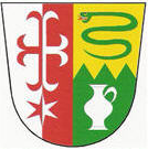 Znak obce Pavlice (okres Znojmo)